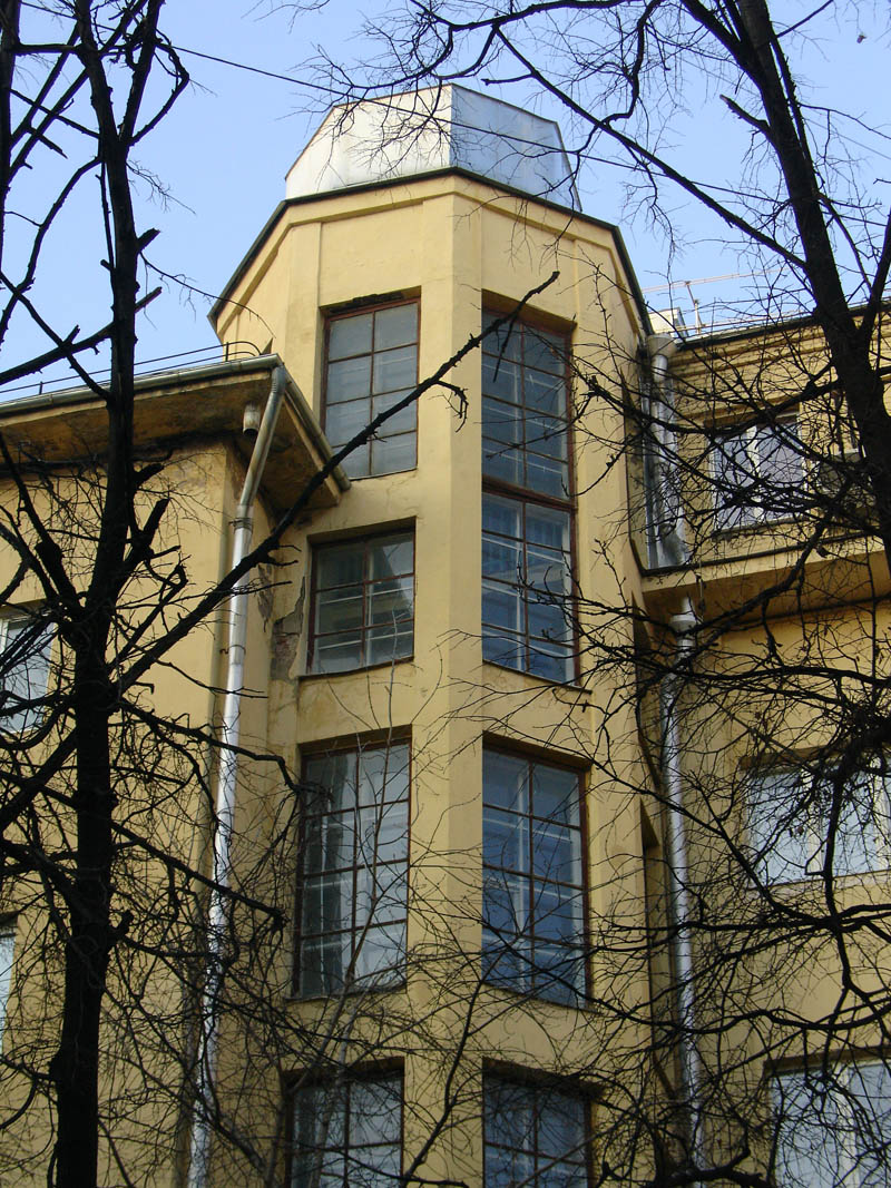 15, Furmanny Lane, Moscow